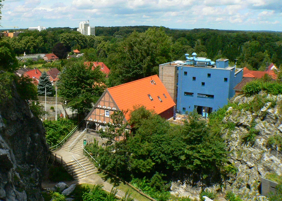 Noctalis - Museum rund um die Fledermaus in Bad Segeberg, Germany